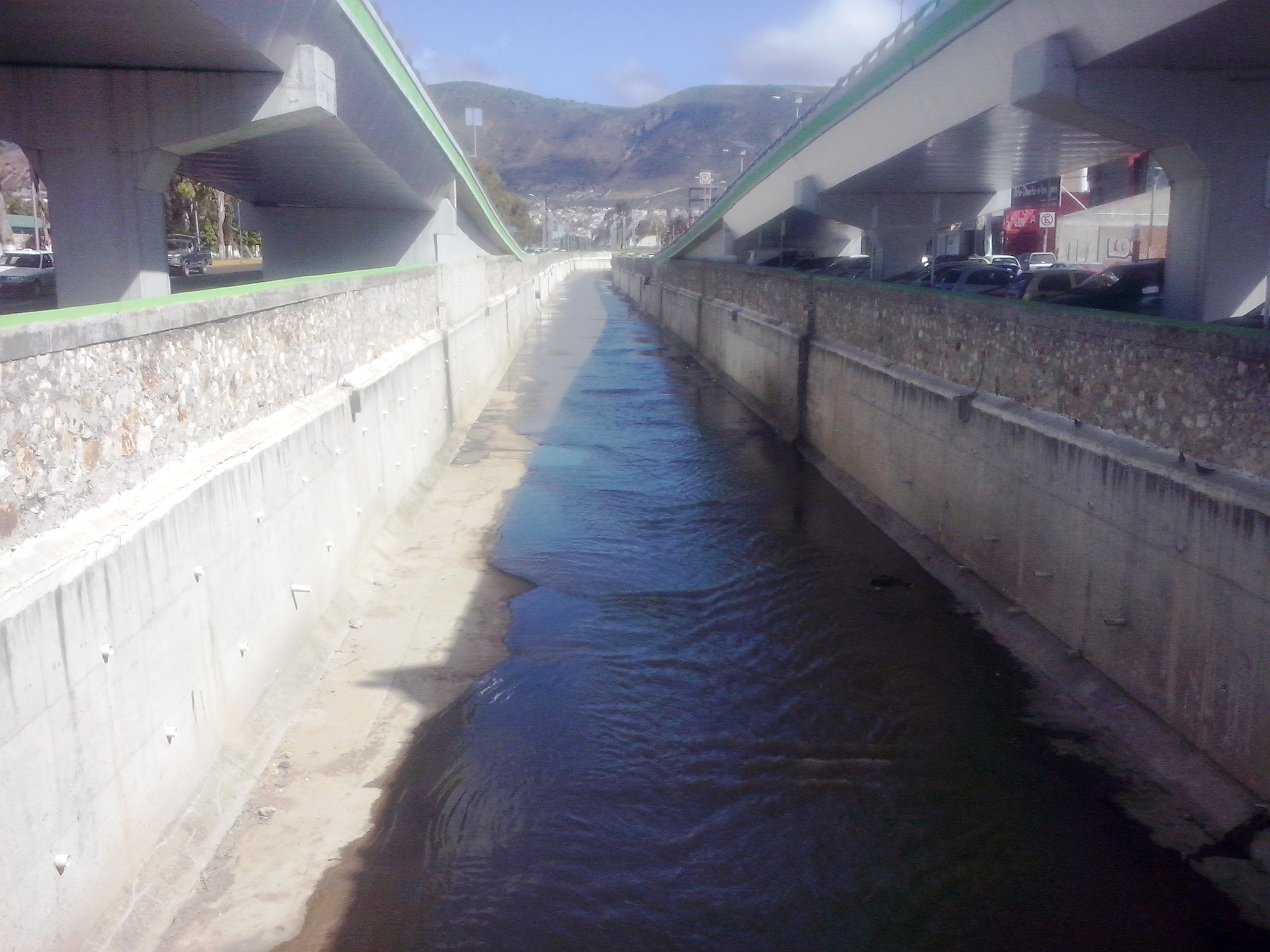 Río de las Avenidas (Pachuca)